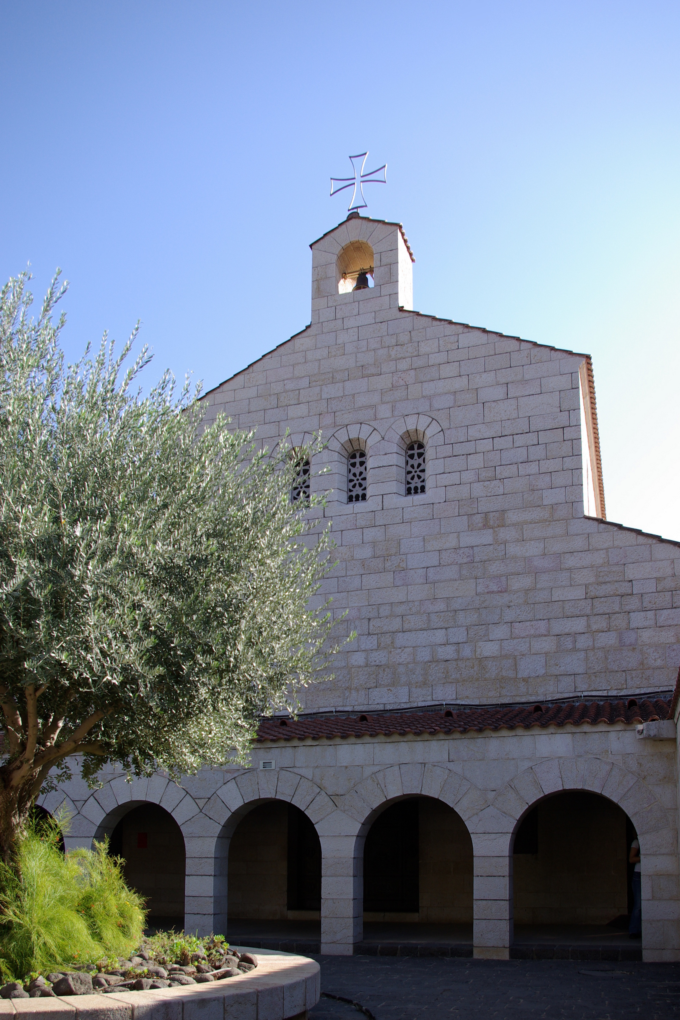 Brotvermehrungskirche in Tabgha